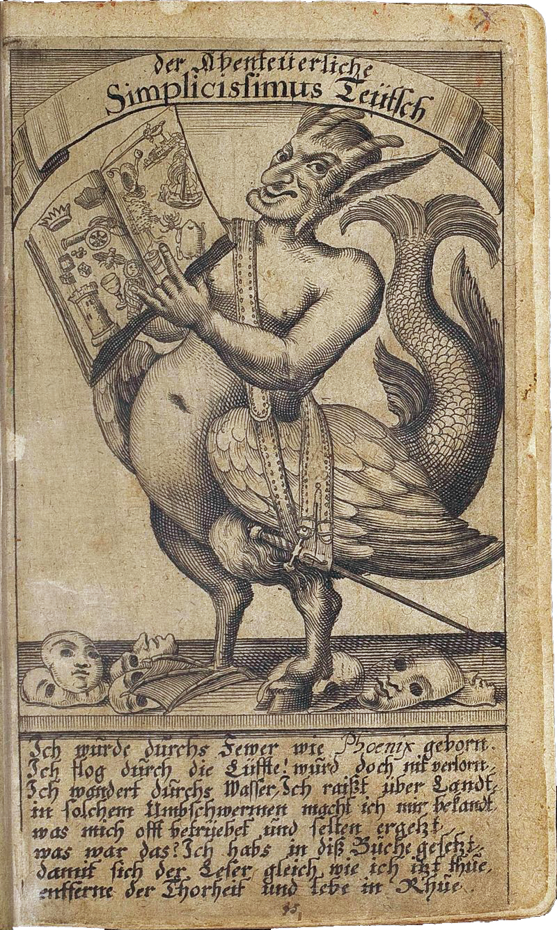 Frontispice